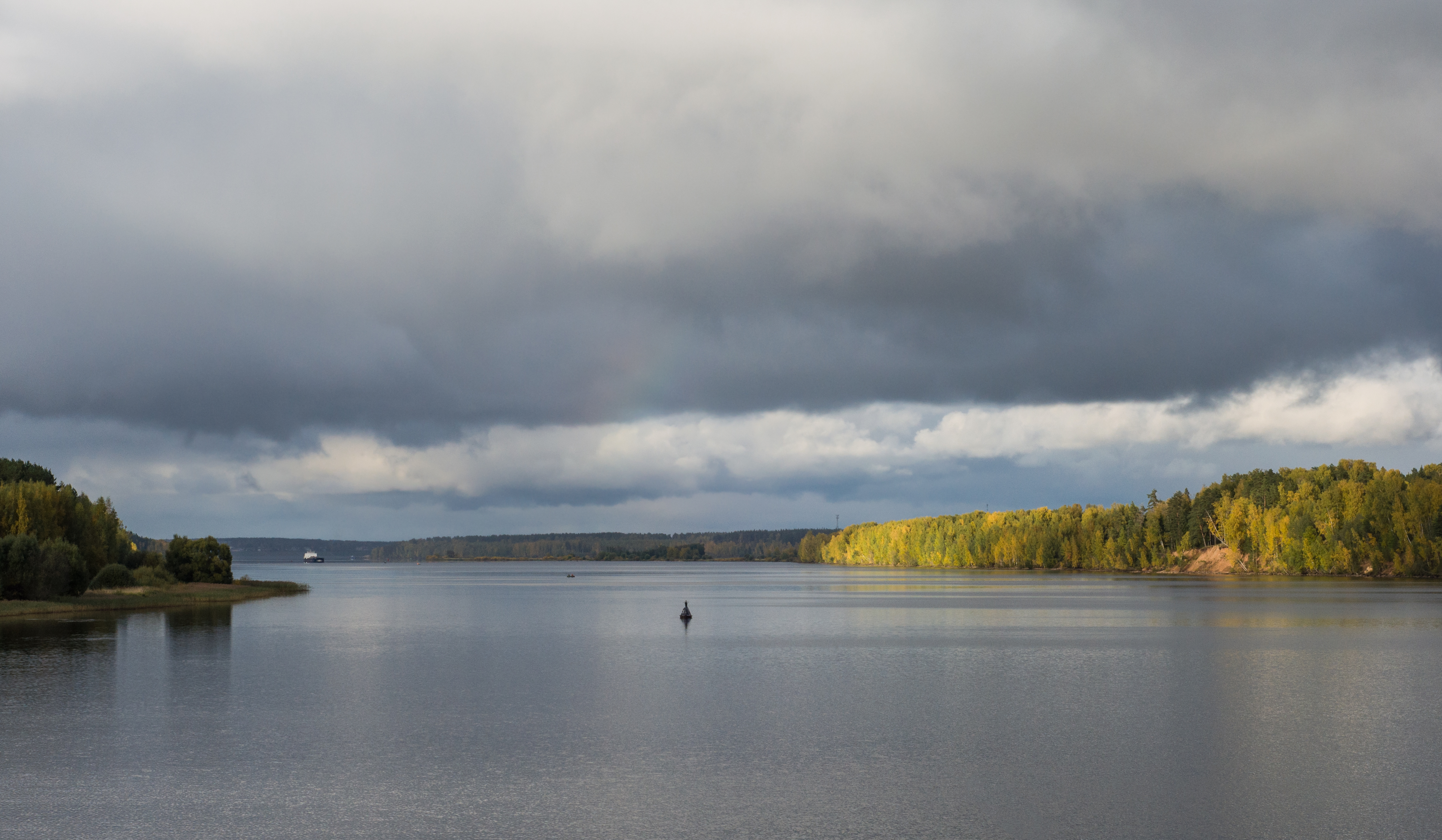 Мышкинский район, Ярославская область. Снято с борта теплохода "Леонид Соболев".